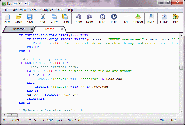 Imagen mostrando el editor de codigo BASIC de BasictoPHP.